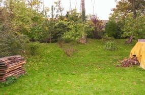 Nakskovs fæstning